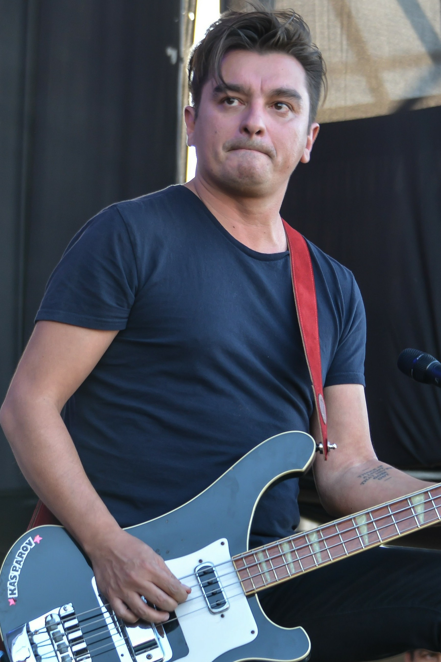 Mauricio Durán en la Cumbre del Rock Chileno 2018, Santiago, Chile